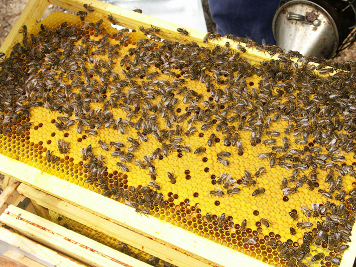 Rayon de ruche, présentant le couvain operculé (jaune)